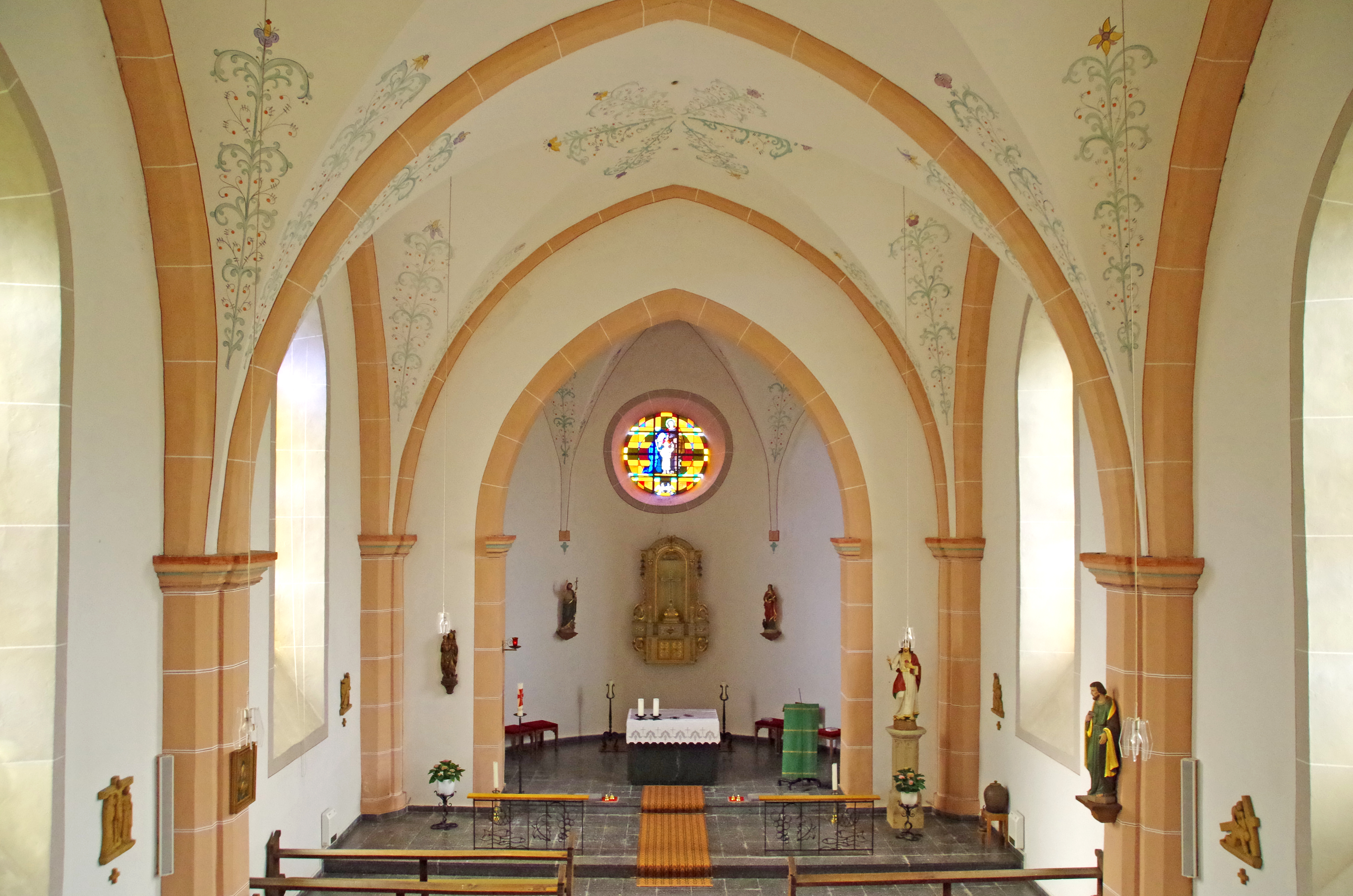 St. Johannes Evangelist (Niederweis) von Süden